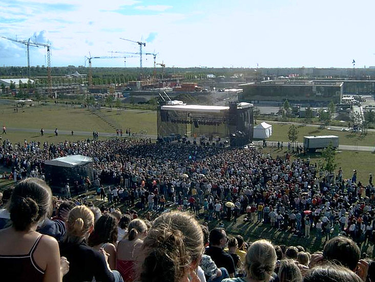 Dieses Bild zeigt den Auftritt der Wise Guys auf der Bundesgartenschau BUGA am 2. Juli 2005 in München.